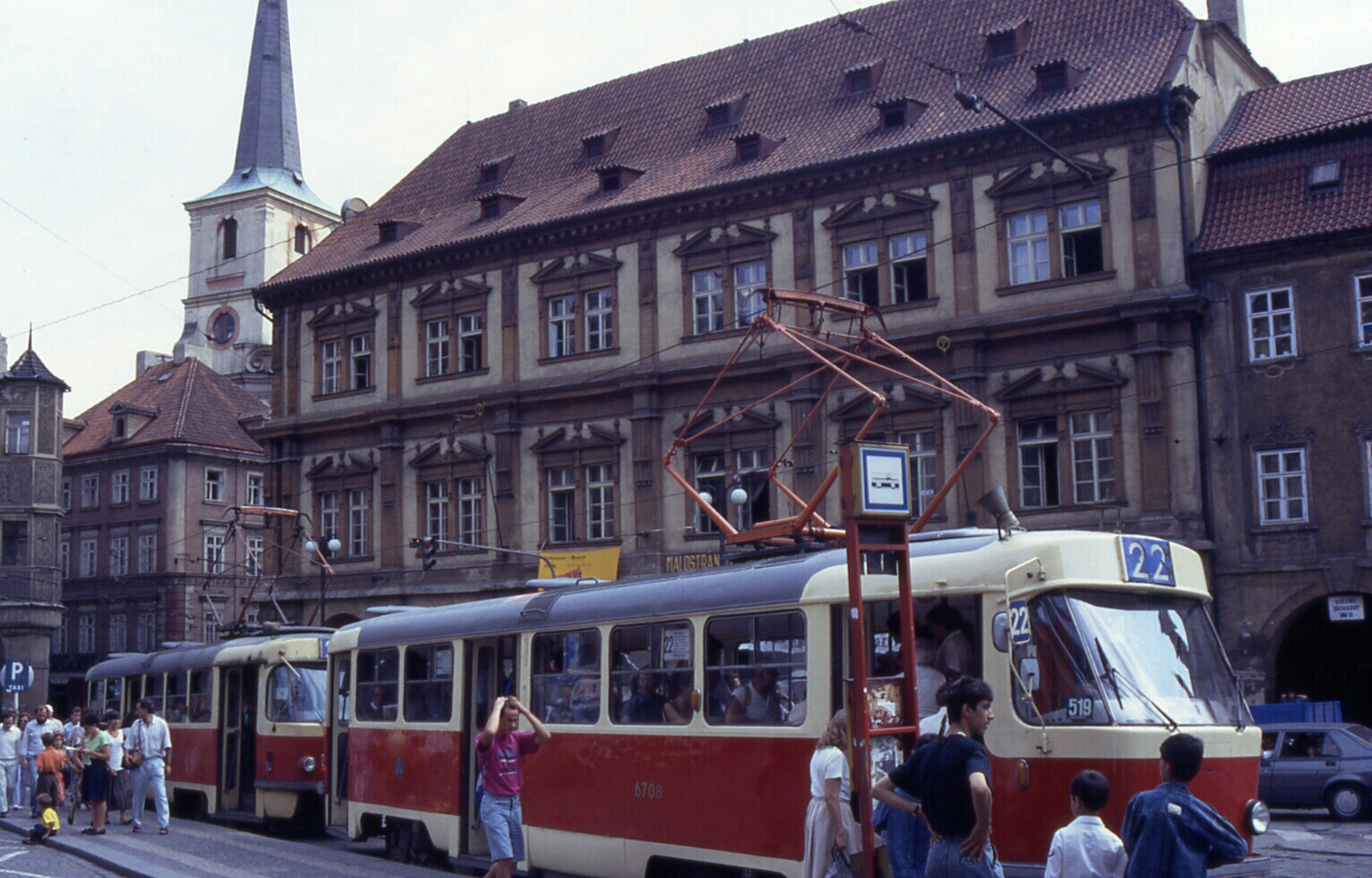 prag Straßenbahn 1990